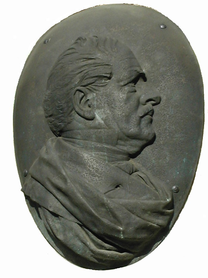 Hasselbach, 2004 selbst fotografiert; GNU_FDL